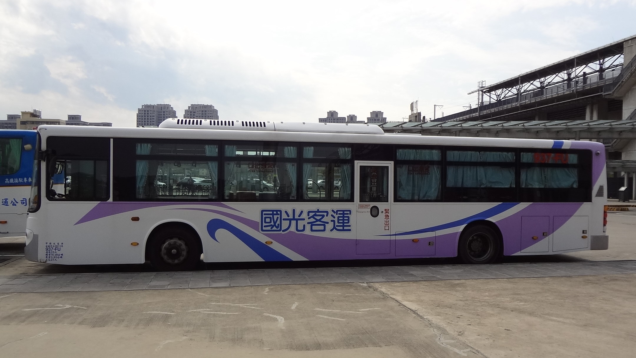 國光客運的Daewoo BS120CN大客車937-FU左側外觀